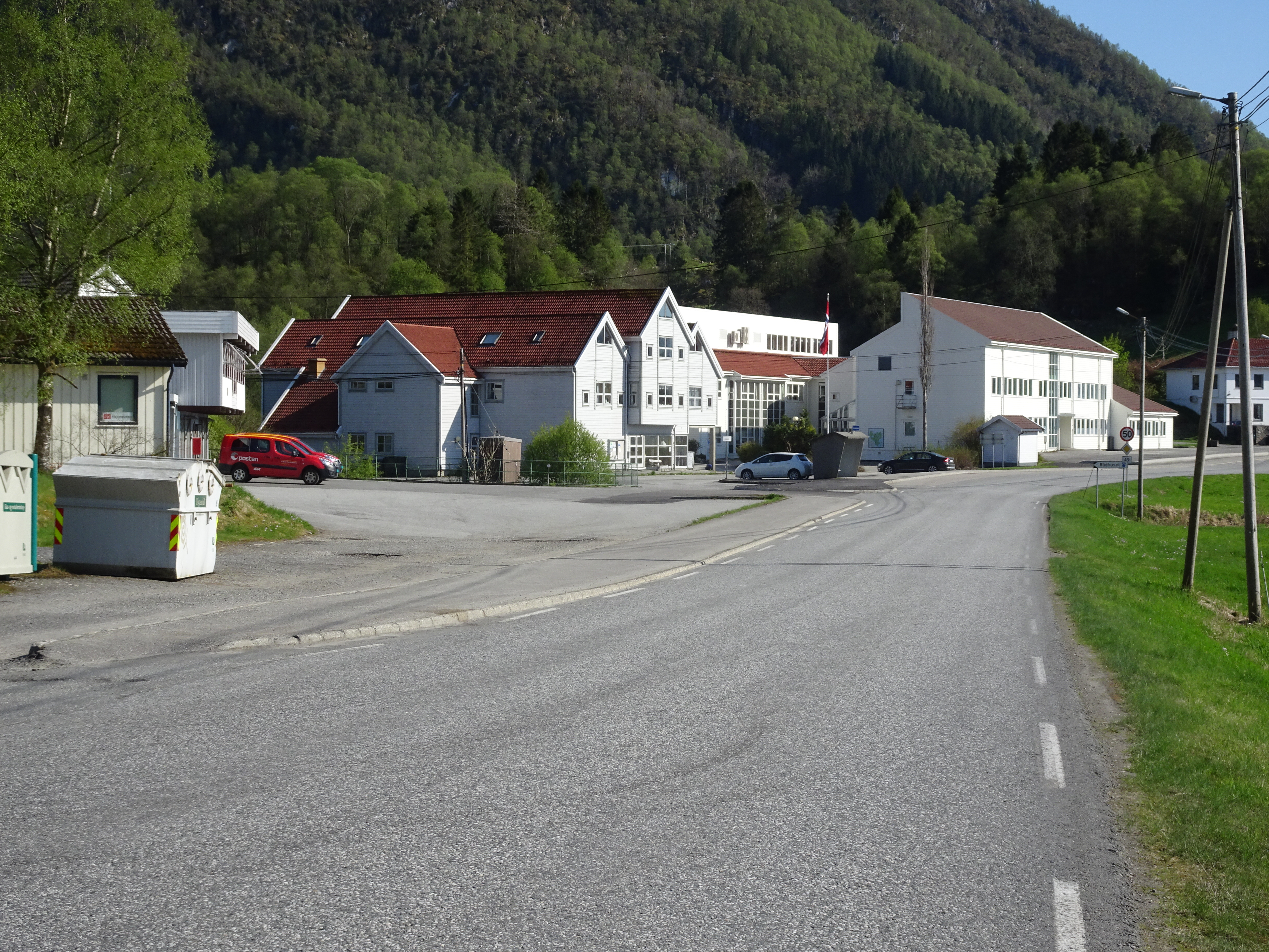 Hollekjevegen (primær fylkesvei 549, tidl. 49) sørover gjennom Uggdal